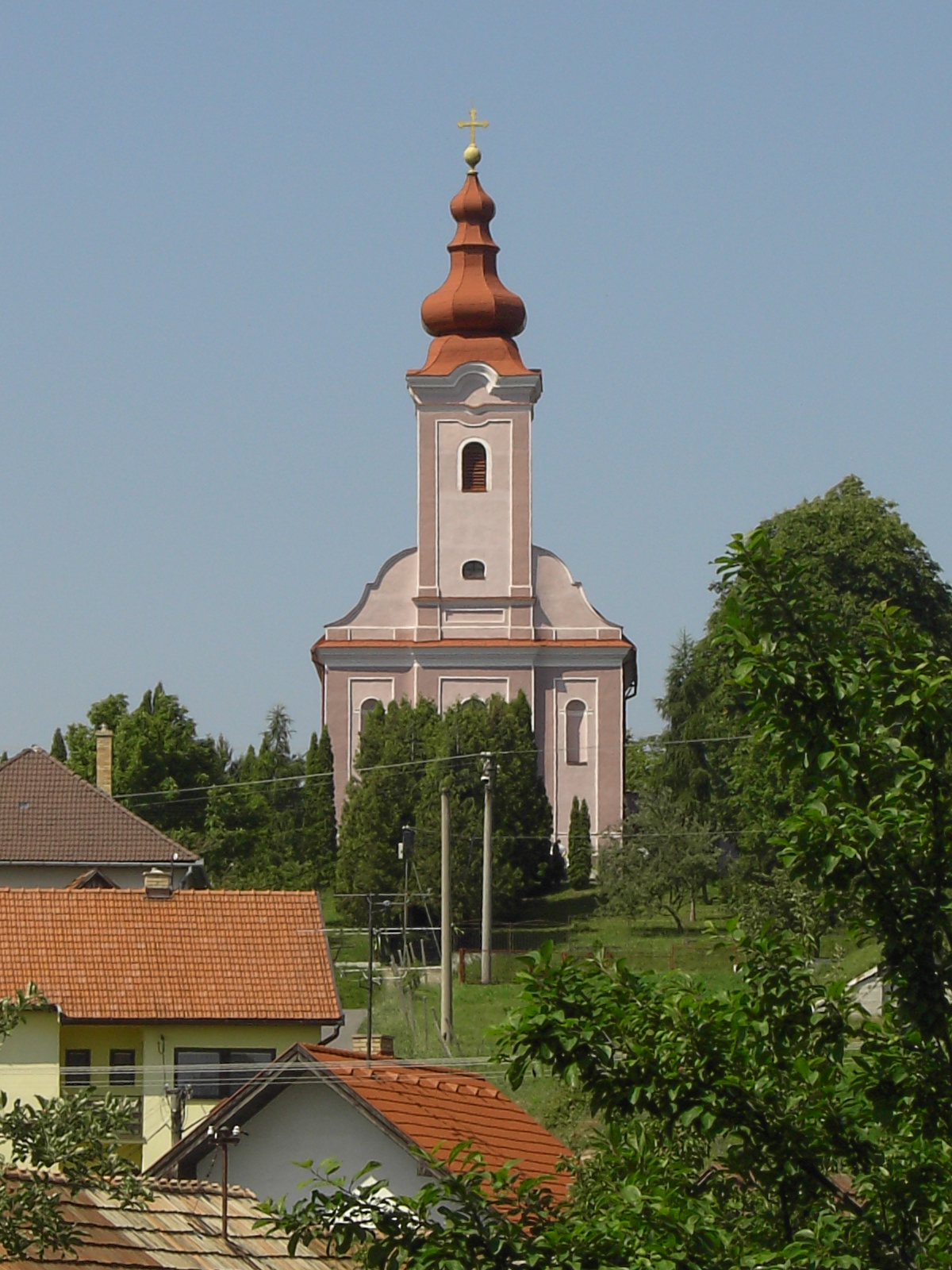 Beschreibung: Kirche von Csáb eigenes Foto von User:Ralf 69 Datum:11.06.2006